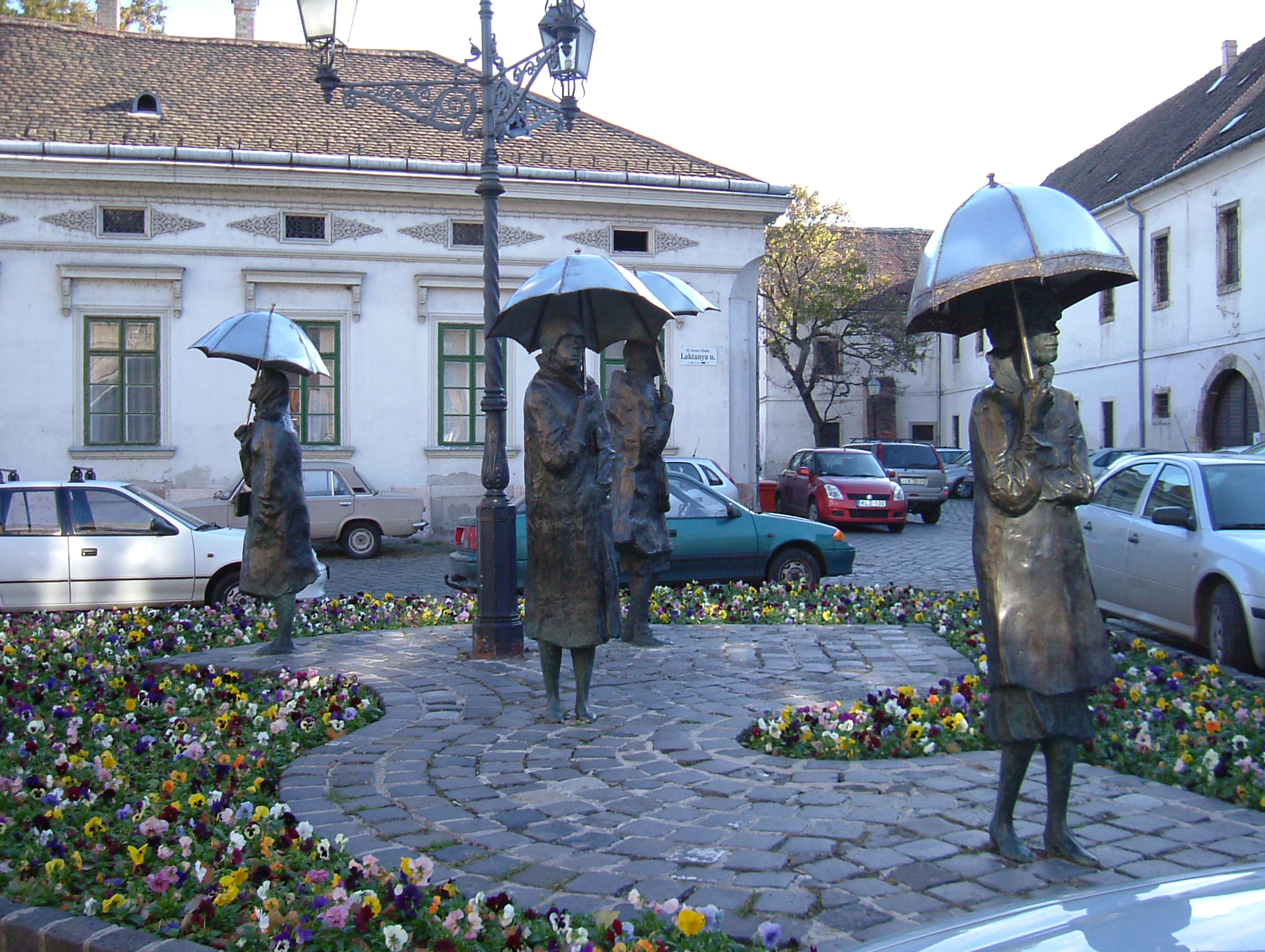 Esőben. Varga Imre szobra Óbudán